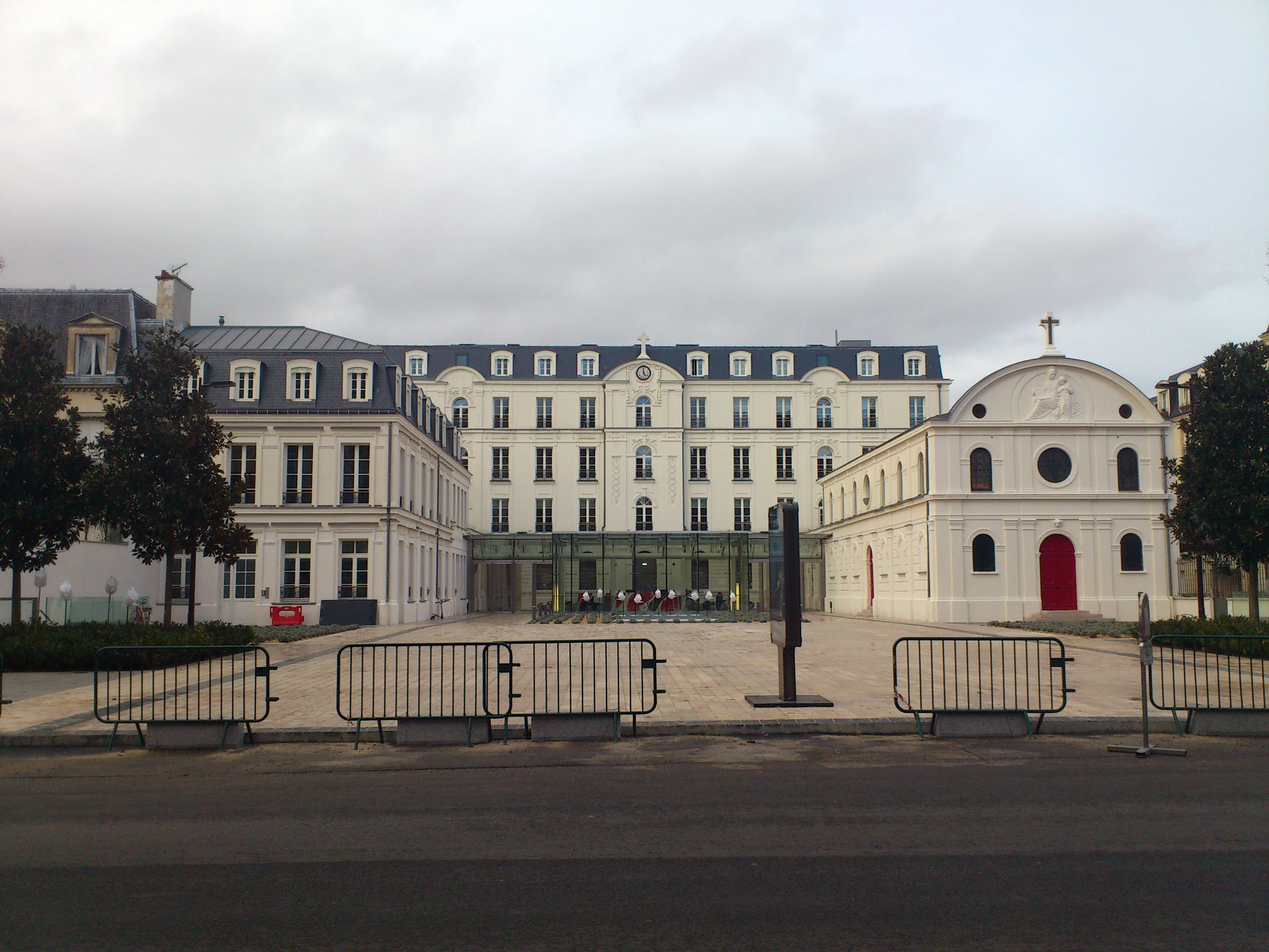 Le théâtre des Sablons, centre culturel de Neuilly-sur-Seine, ouvert en 2013 dans l'ancienne Maison Sainte-Anne (ancienne maison de retraite tenue par des sœurs) totalement rénovée et réaménagée. 68-70 avenue du Roule. .